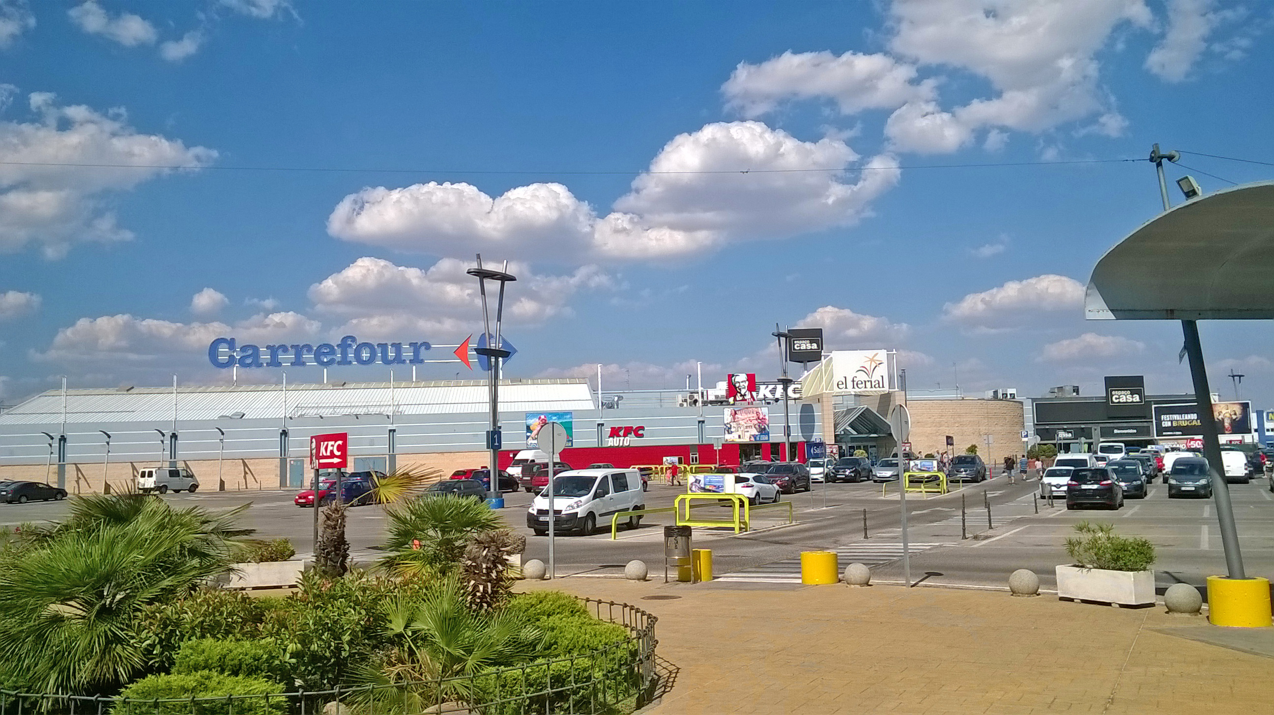 Paisaje fotográfico del centro comercial el Ferial de Parla